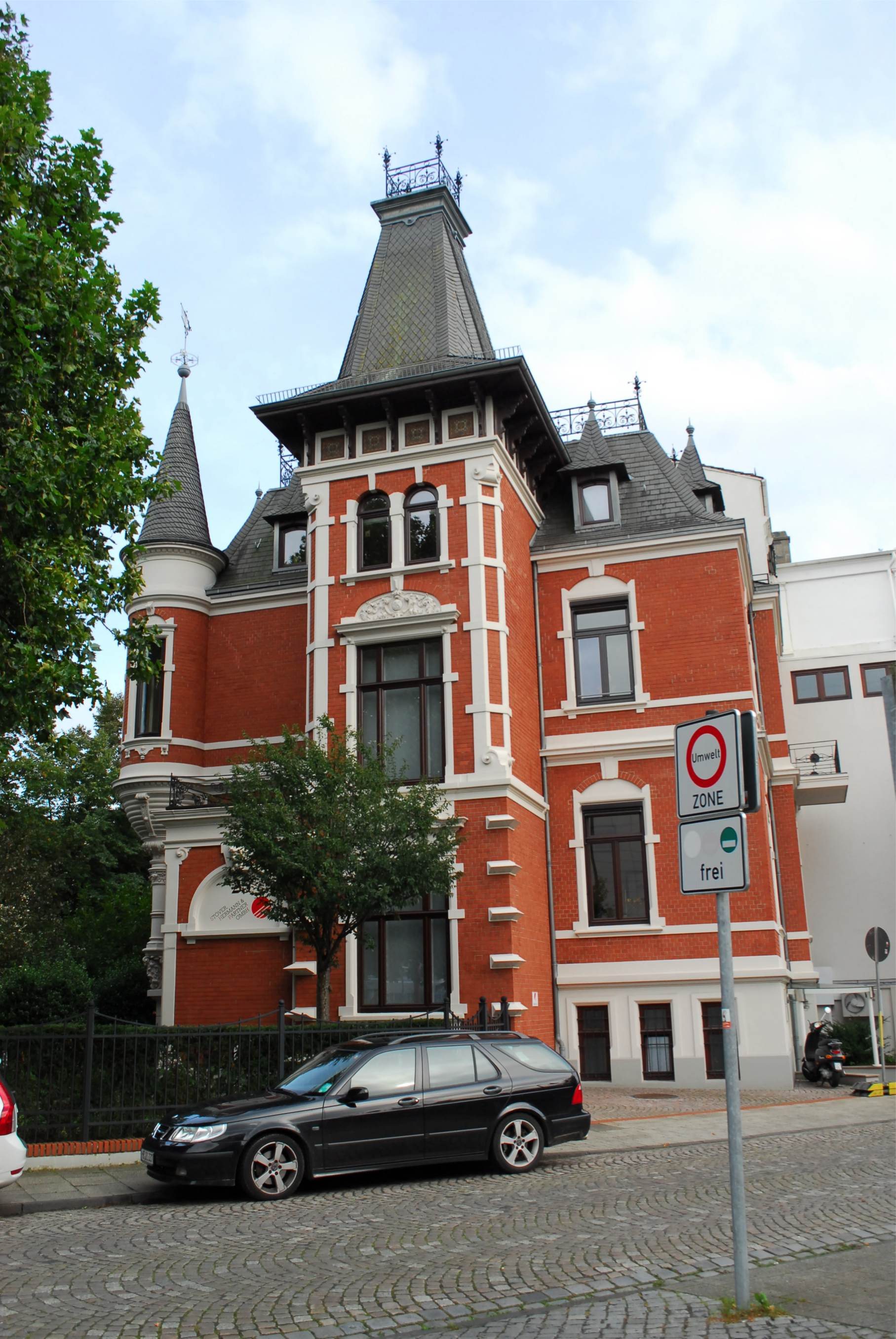 Villa Nebelthau in Bremen, Hollerallee 25.Das abgebildete Objekt ist ein geschütztes Kulturdenkmal in der Freien Hansestadt Bremen, mit der Nr. 1696 beim Landesamt für Denkmalpflege registriert.